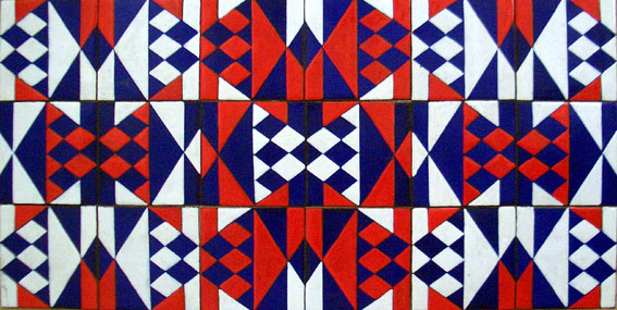 Bednay Dezső: Vörös-kék kompozíció; tűzzománc